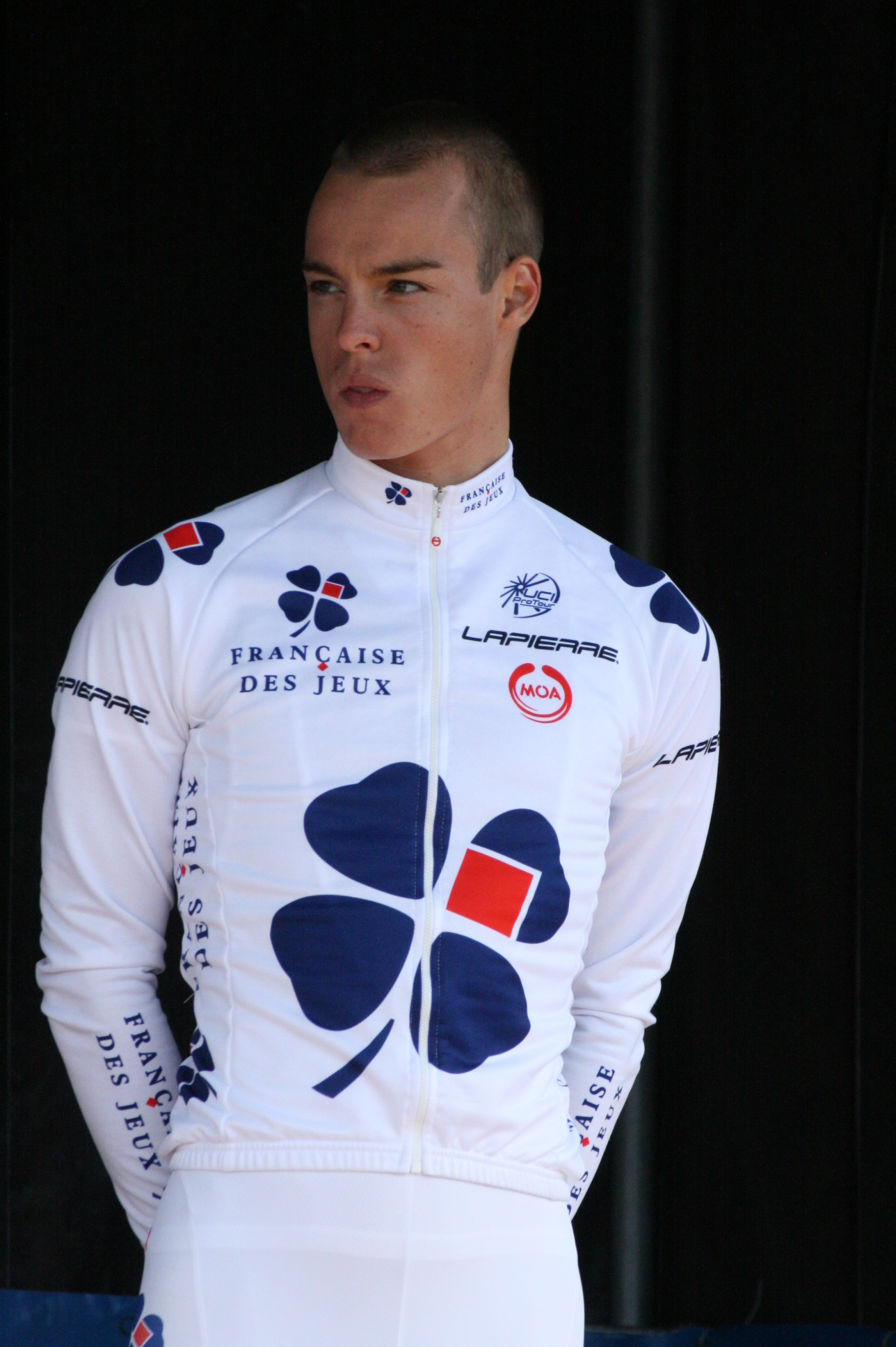 Gianni Meersman, lors de la présentation des équipes des 4 jours de Dunkerque 2010